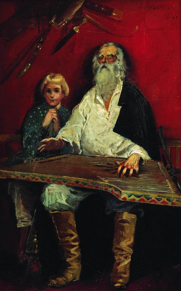 Слепой гусляр, поющий старинку. 1887. Холст, масло. 102x71,2 см. Государственная Третьяковская галерея, Москва